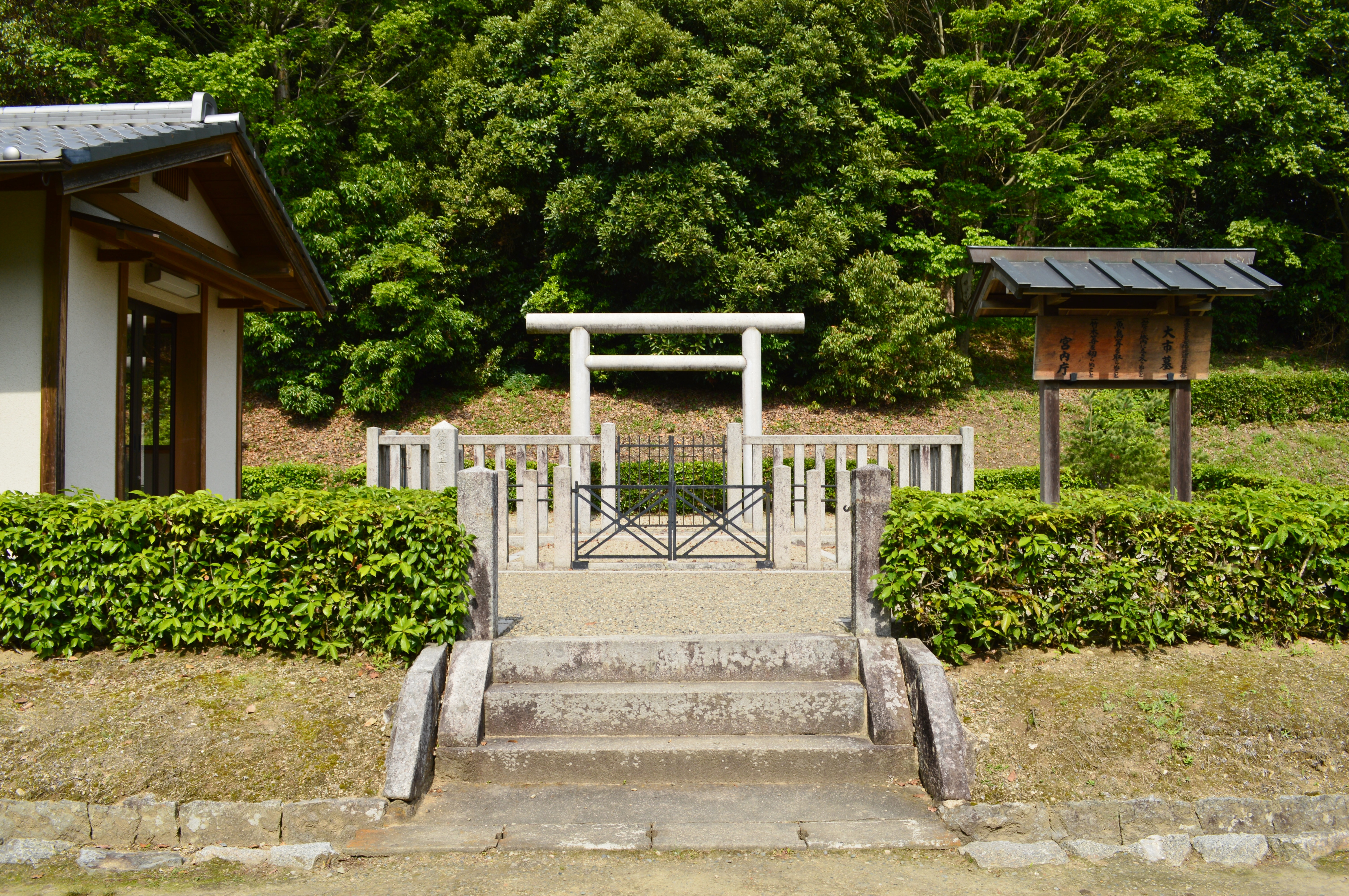 倭迹迹日百襲姫命大市墓 (箸墓古墳) 入り口